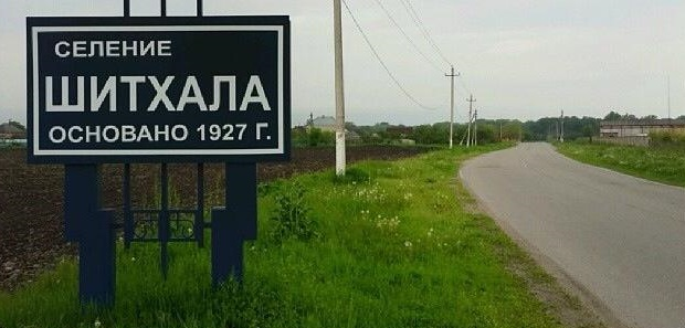 Въезд в Шитхалу